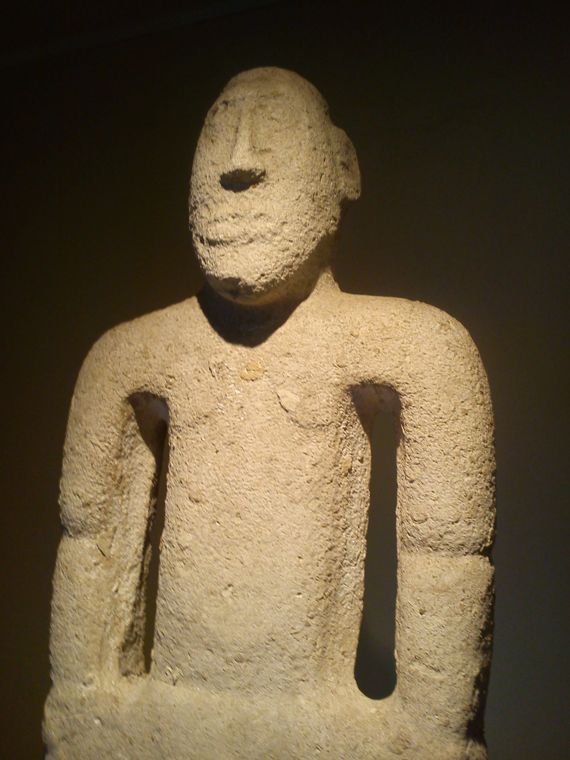 Espiga de piedra antropomorfa de tamaño natural, proveniente del valle del río Grande de Térraba. Estas estatuas eran utilizadas como marcadores territoriales o se ponían en las entradas de los templos. Museo Nacional de Costa Rica.